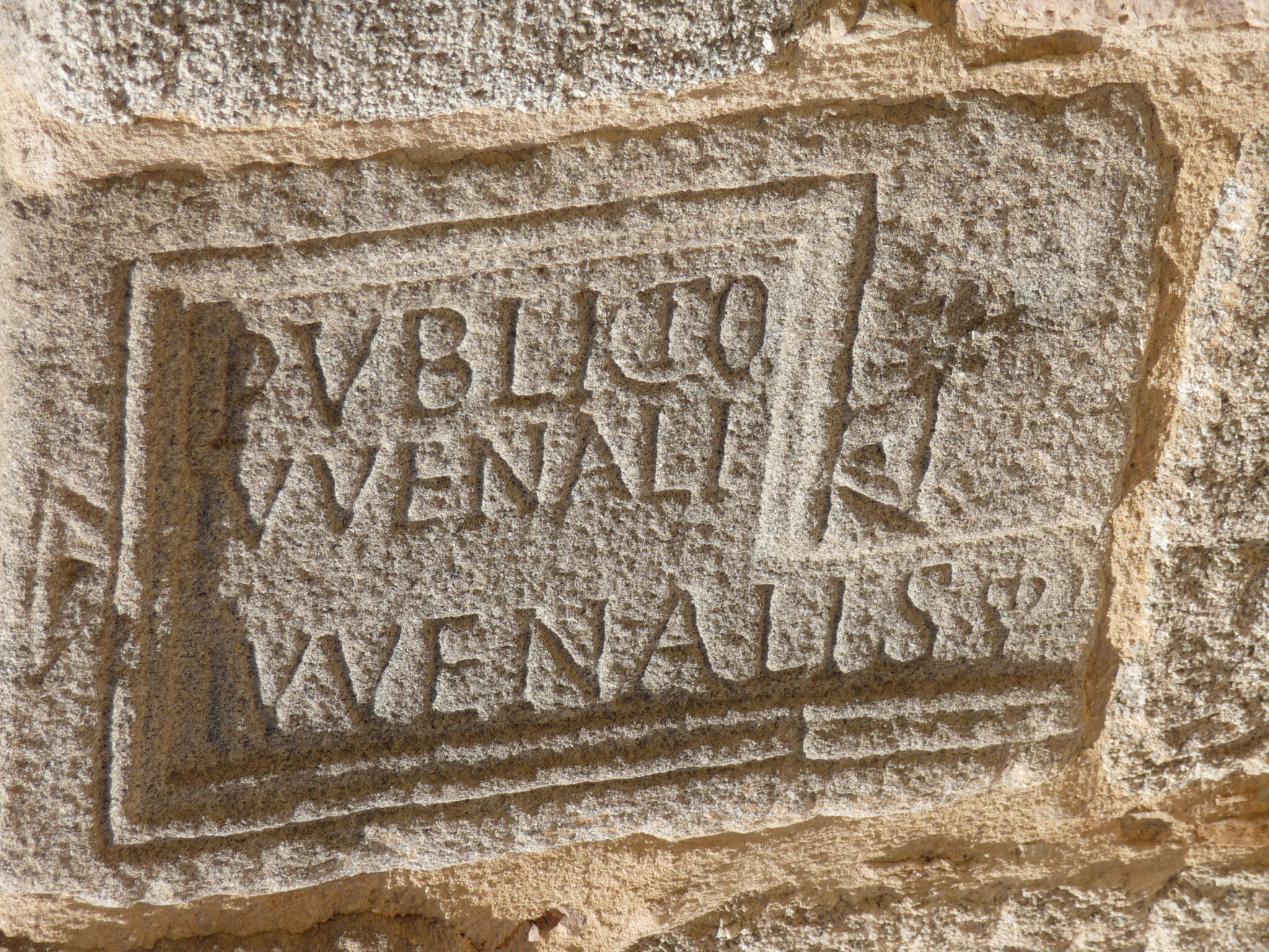 En tabula ansata sobre bloque de granito empotrado al revés en un torreón de la muralla de Segovia (Hispania) juntó a la puerta de San Andrés PVBLICIO/ IVVENALI/ IVVENALIS (hedera) Publicio/ Iuvenali/ Iuvenalis (filio) (hédera) A Publicio Juvenal, hijo de Juvenal Hispania Epigraphica Online